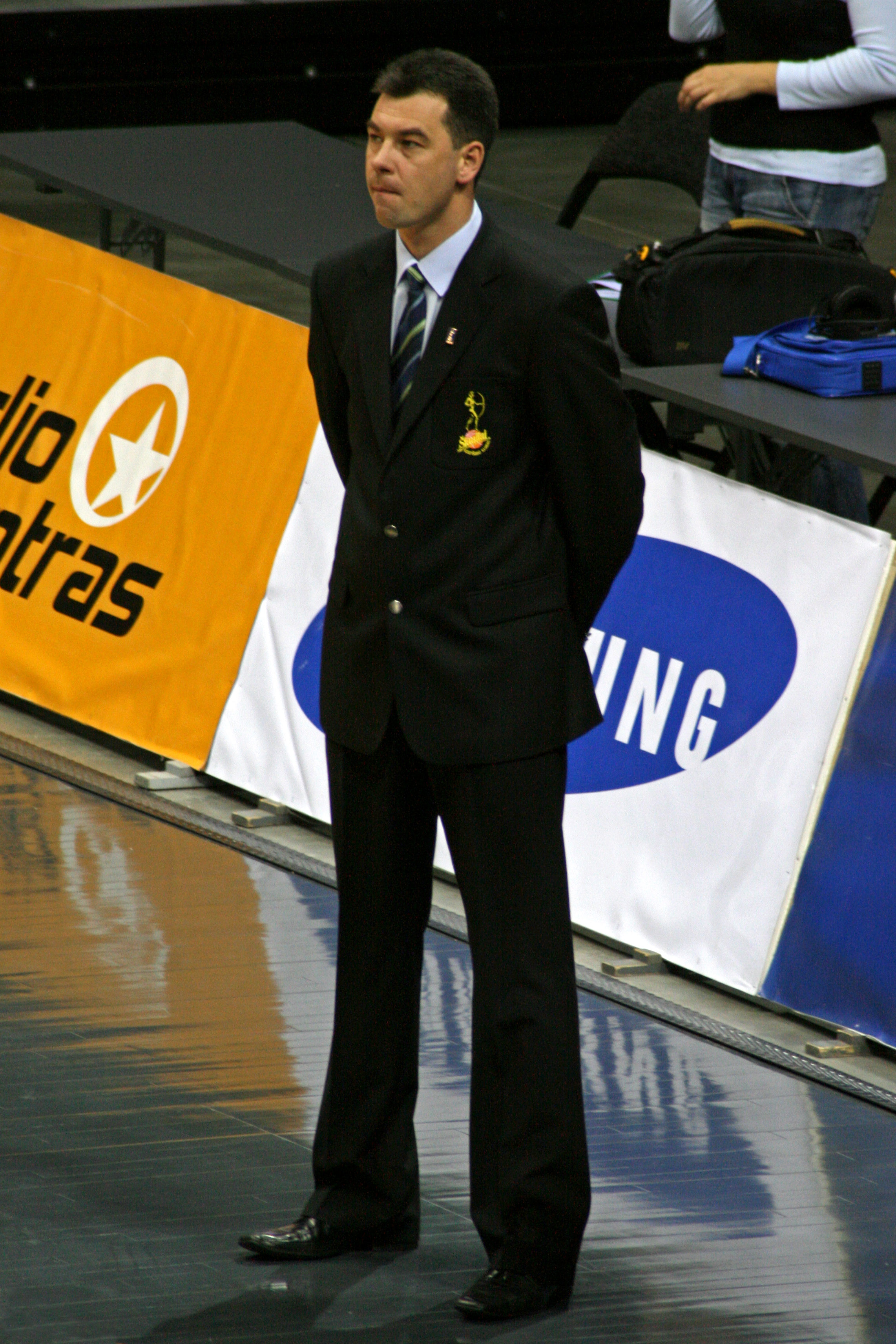 Robertas Giedraitis